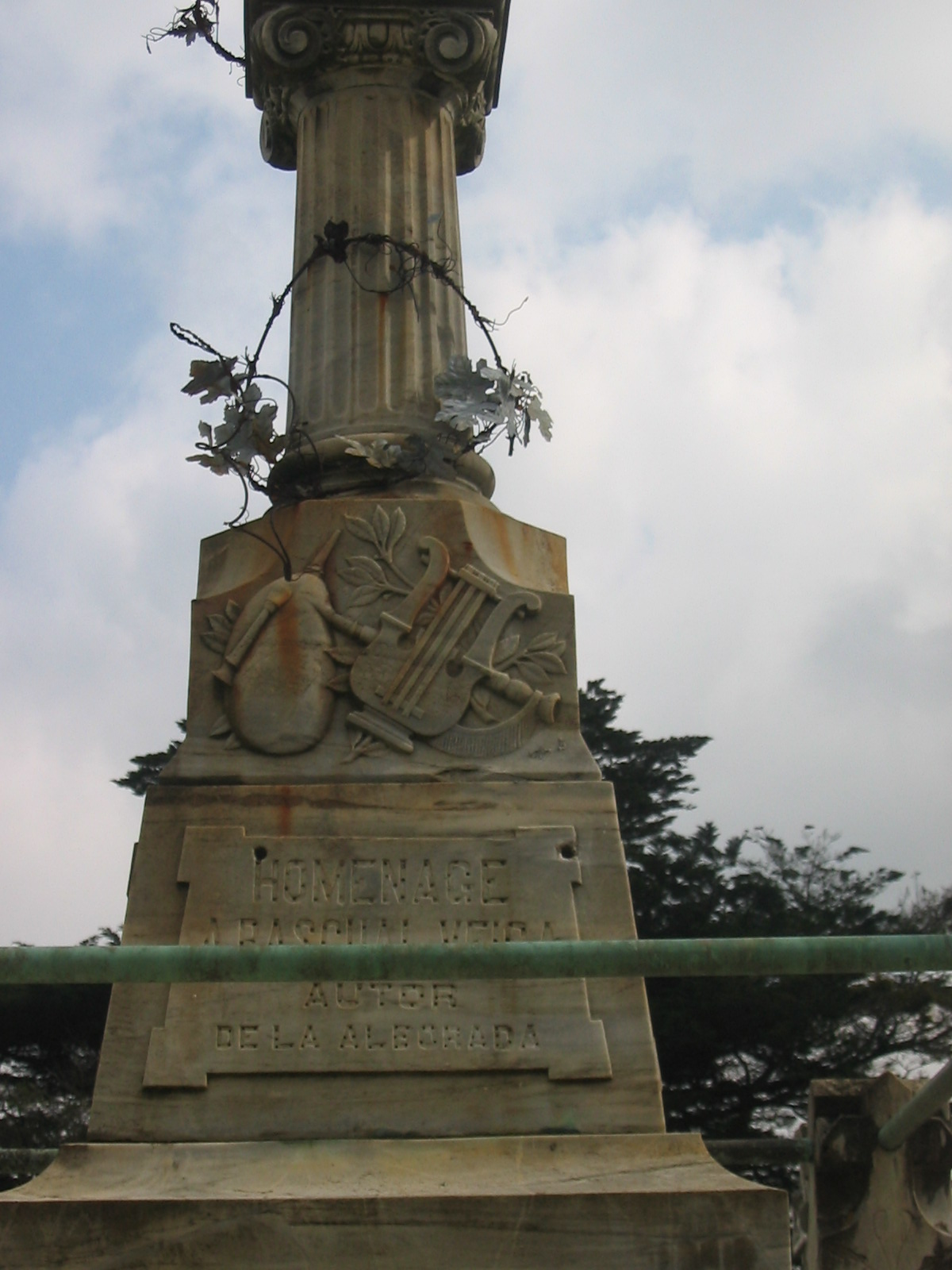 Tumba de Pascual Veiga en Mondoñedo/Spanish Musician Pascual Veiga's Grave on Mondoñedo.